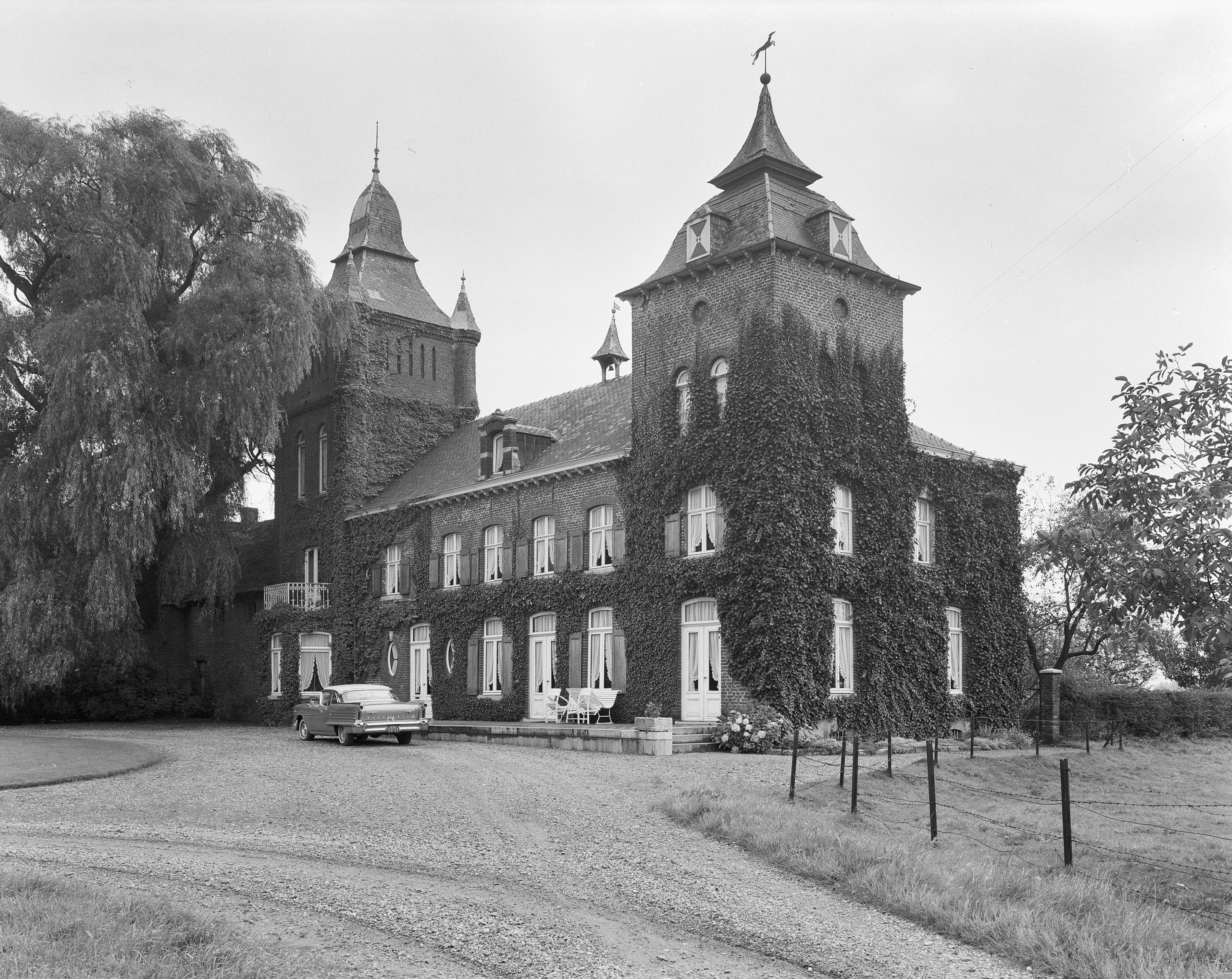 Huis Heysteren En Huis Ravenburg: exterieur overzicht, Huis Heysteren